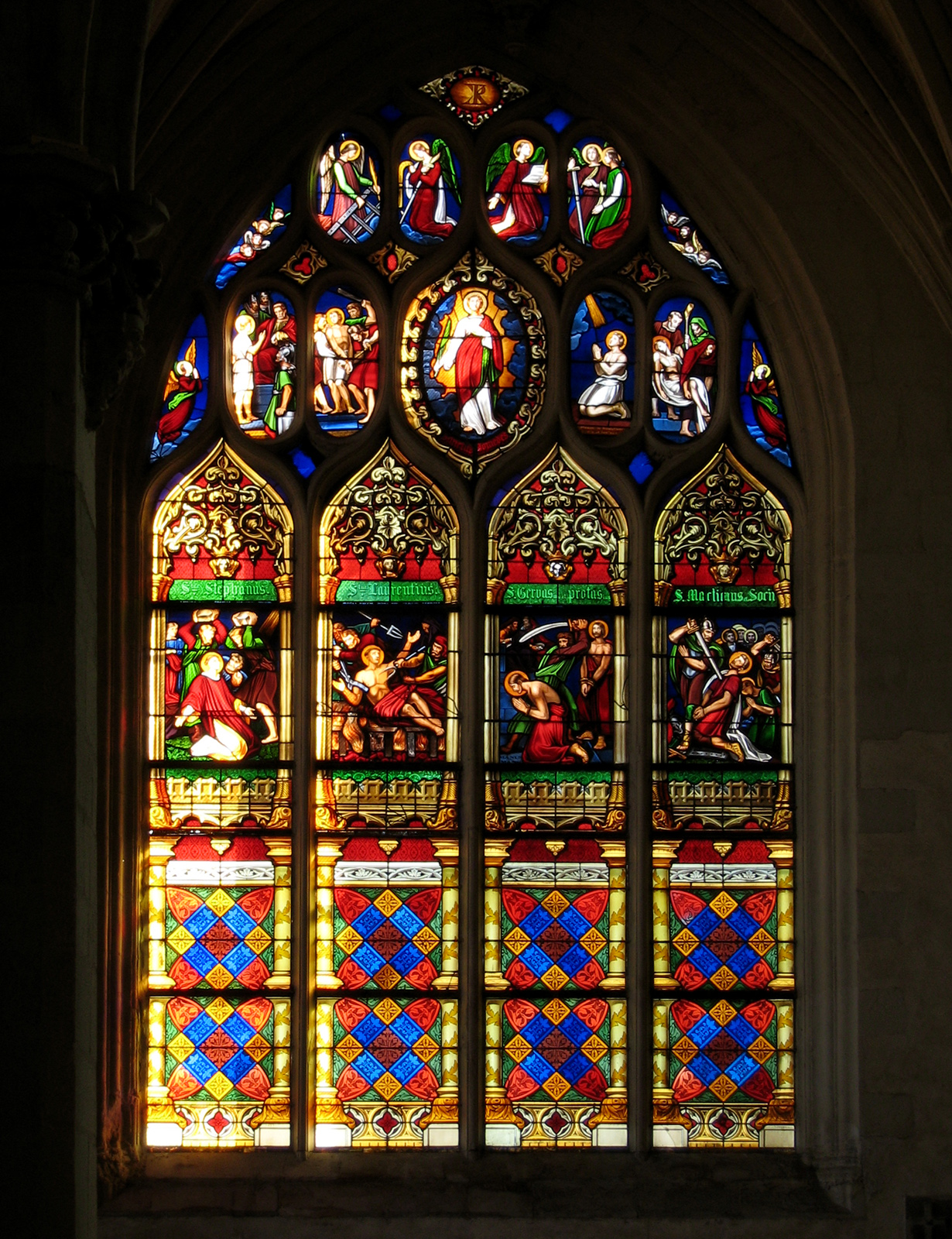 Dernière travée du collatéral nord du chœur de la cathédrale de la Sainte-Trinité à Laval (53). Vitrail de saints martyres Étienne, Laurent, Paul et ?